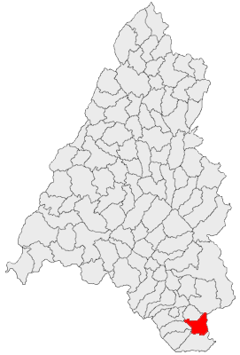 Categorie:Hărţi ale judeţului Bihor